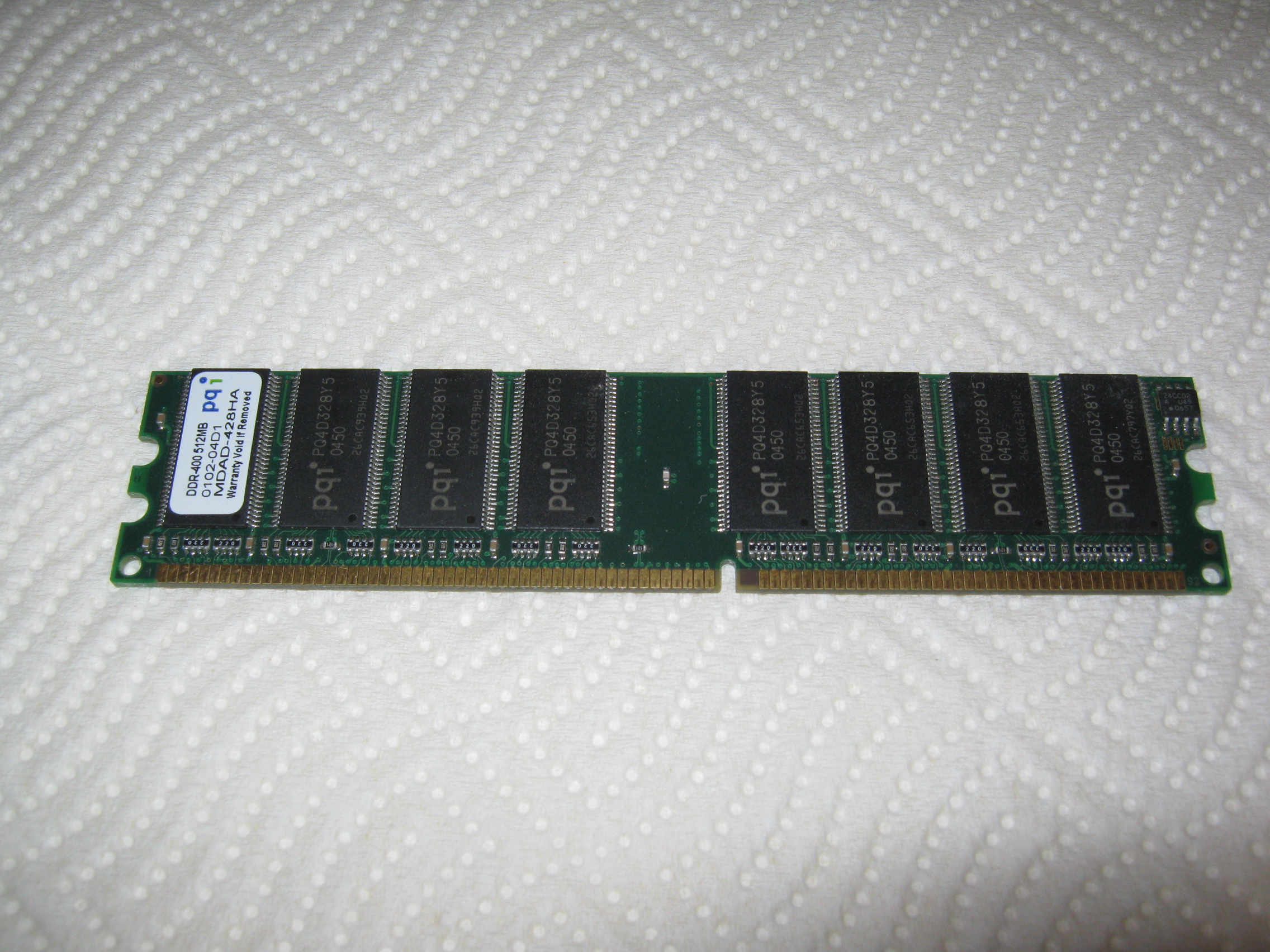 PQI DDR400 RAM MDAD-428HA.